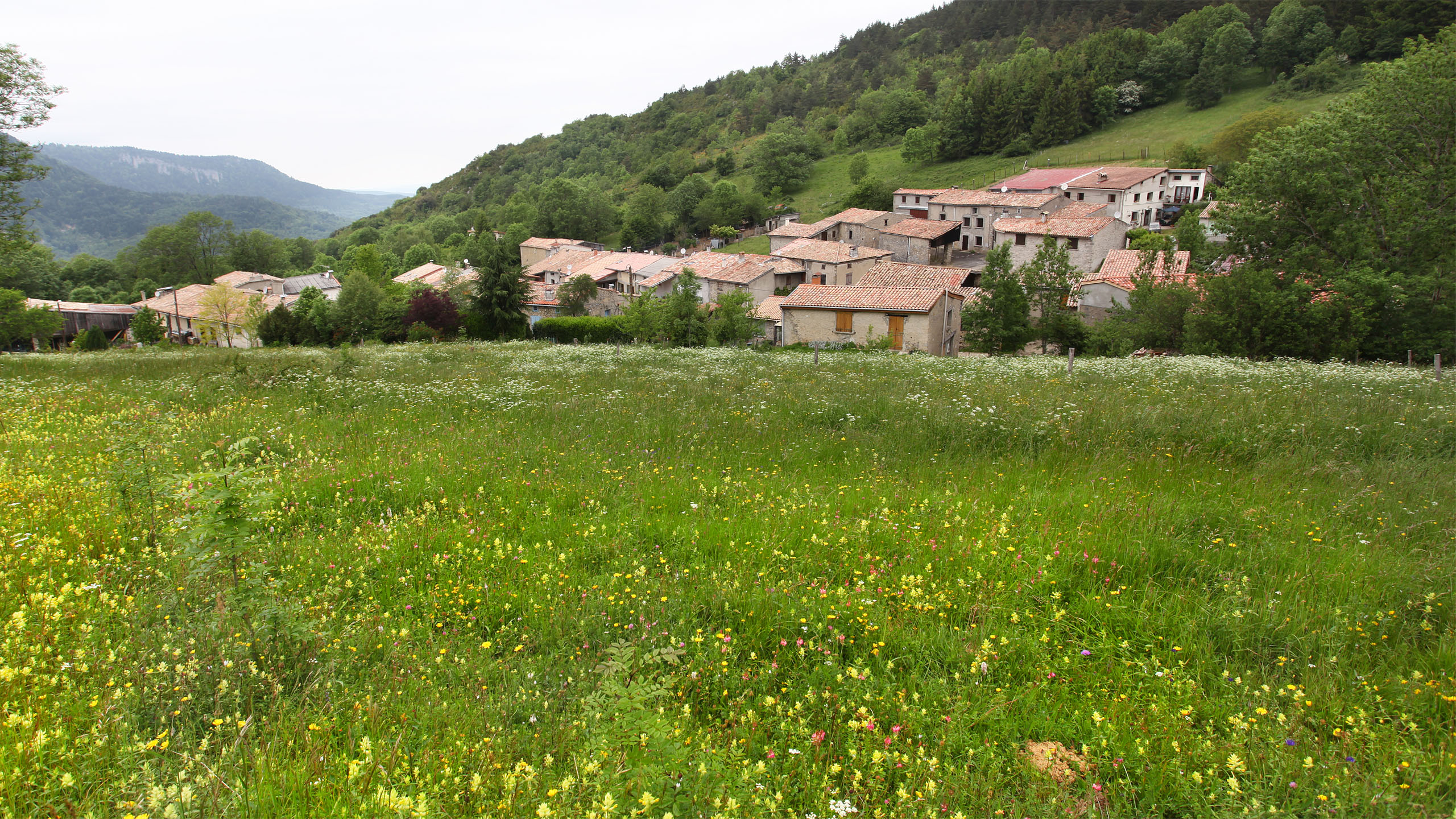 Vue générale hameau de Belvis